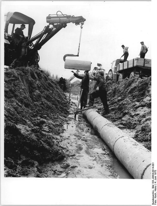 Köhra, Meliorationsarbeiten Zentralbild Koch-4.6.70-ch Bezirk Leipzig: Meliorationsvorhaben im Kreis Grimma - Unter erschwerten Bedingungen verlegen Meliorationsarbeiter des VEB Meliorationsbau Leipzig, Betriebsteil Böhlitz- Ehrenberg, die Sammelleitung. Mit ihrer Arbeit helfen sie den Genossenschaftsbauern der LPG Köhra, die Bodenfruchbarkeit zu verbessern.